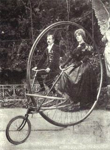 Wohl in einer Ausstellungs-Halle neben einer Engelsfigur fotografierte ein noch nicht identifizierter Fotograf den hannoverschen "Flugpionier" Karl Jatho und dessen Schwester auf dem nach Jatho benannten Tandem "Riesen-Sociable-Zweirad", das für die Aufnahme sicher stillstand und stabilisiert wurde. Das Riesenrad fuhr mit der größten aus Holz gefertigten Fahrradfelge der Welt: Eine „Wulst-Pneumatik“, genauer ein Excelsior-Pneumatic-Reifen" der Firma Hannoverschen Gummi-Kamm-Compagnie, Act.-Ges. mit einem Durchmesser von 2,60 m legte bei jeder Umdrehung 8,16 m zurück. Die hölzerne Felge war im Jahr 1900 oder 1901 von den Gebrüdern Forcke in ihrer Fabrik am Immengarten 8 in List hergestellt worden ...